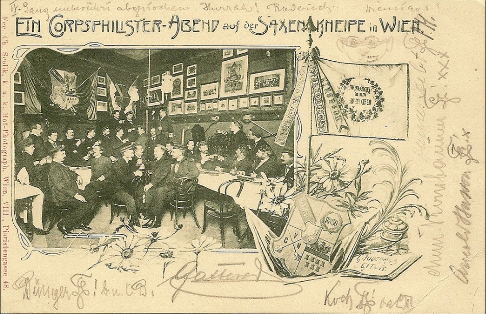 Corps Saxonia Wien, Kneipe der Alten Herren.